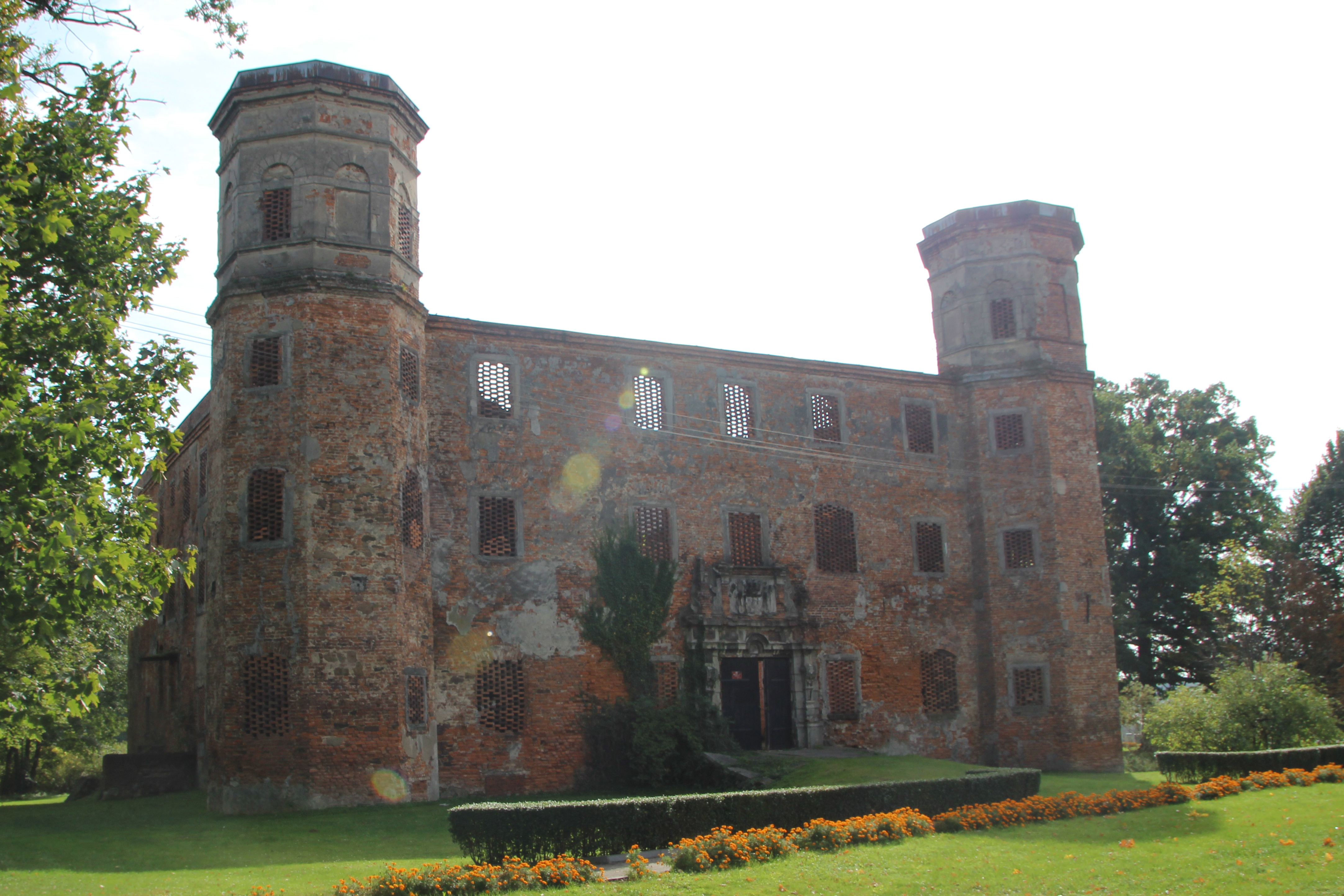 Polska Cerekiew (w j. niem. Groß Neukirch) – wieś w Polsce położona w województwie opolskim, w powiecie kędzierzyńsko-kozielskim, w gminie Polska Cerekiew.